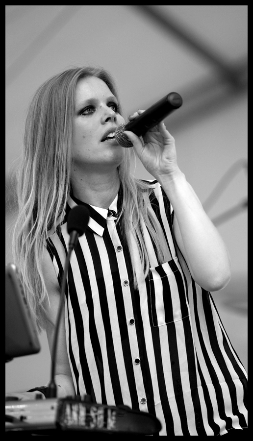 Ann'so M concert Montbeliard